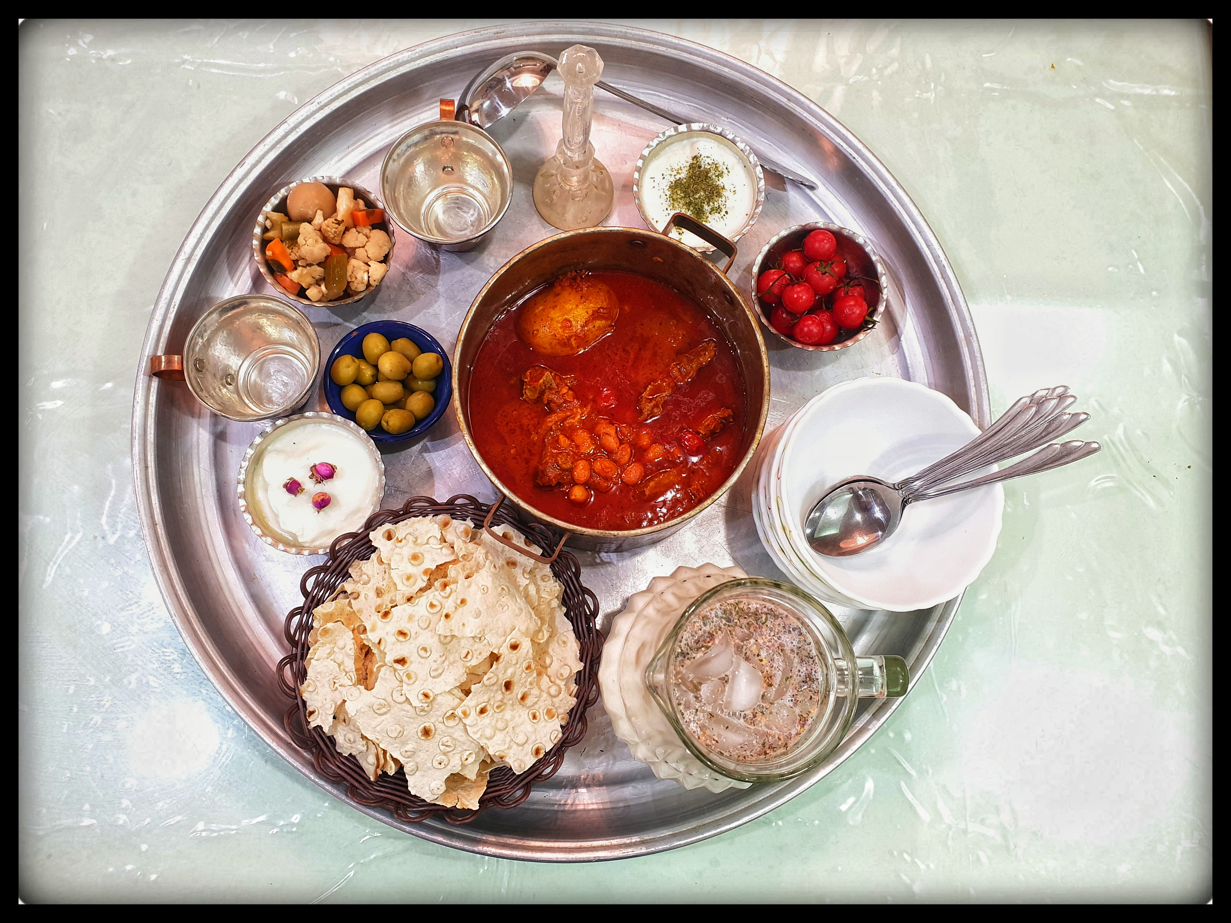 آبگوشت